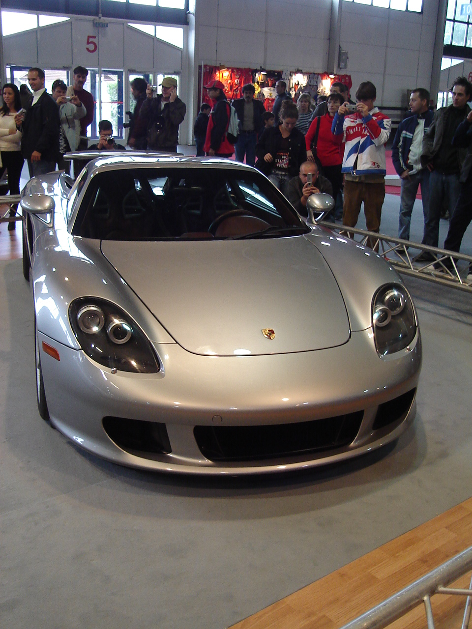 Porsche Carrera egy budapesti luxusautóbemutatón